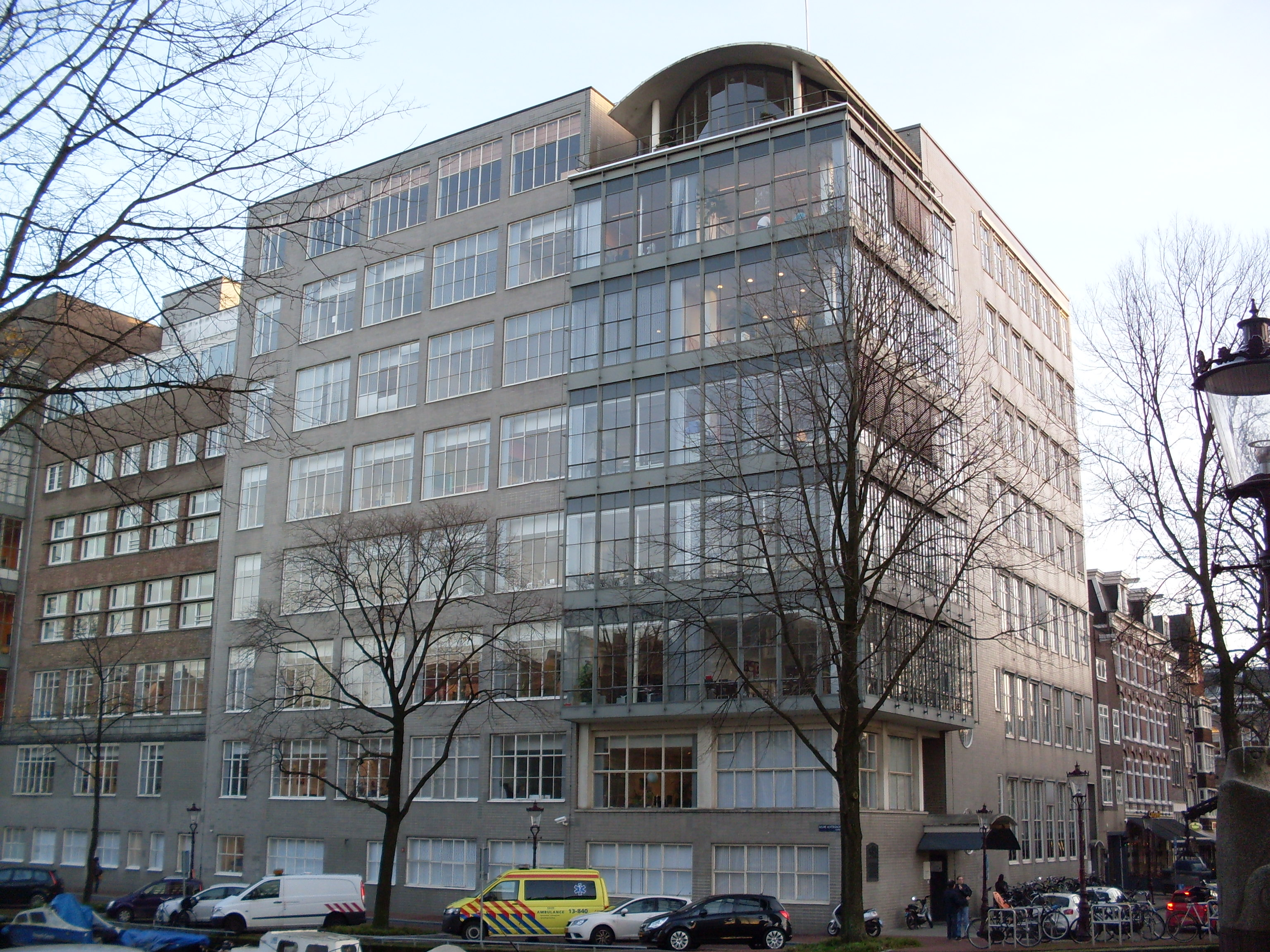 Voormalige Joodsche Invalide Ziekenhuis, Weesperplein 3